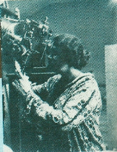 Maria Teohari